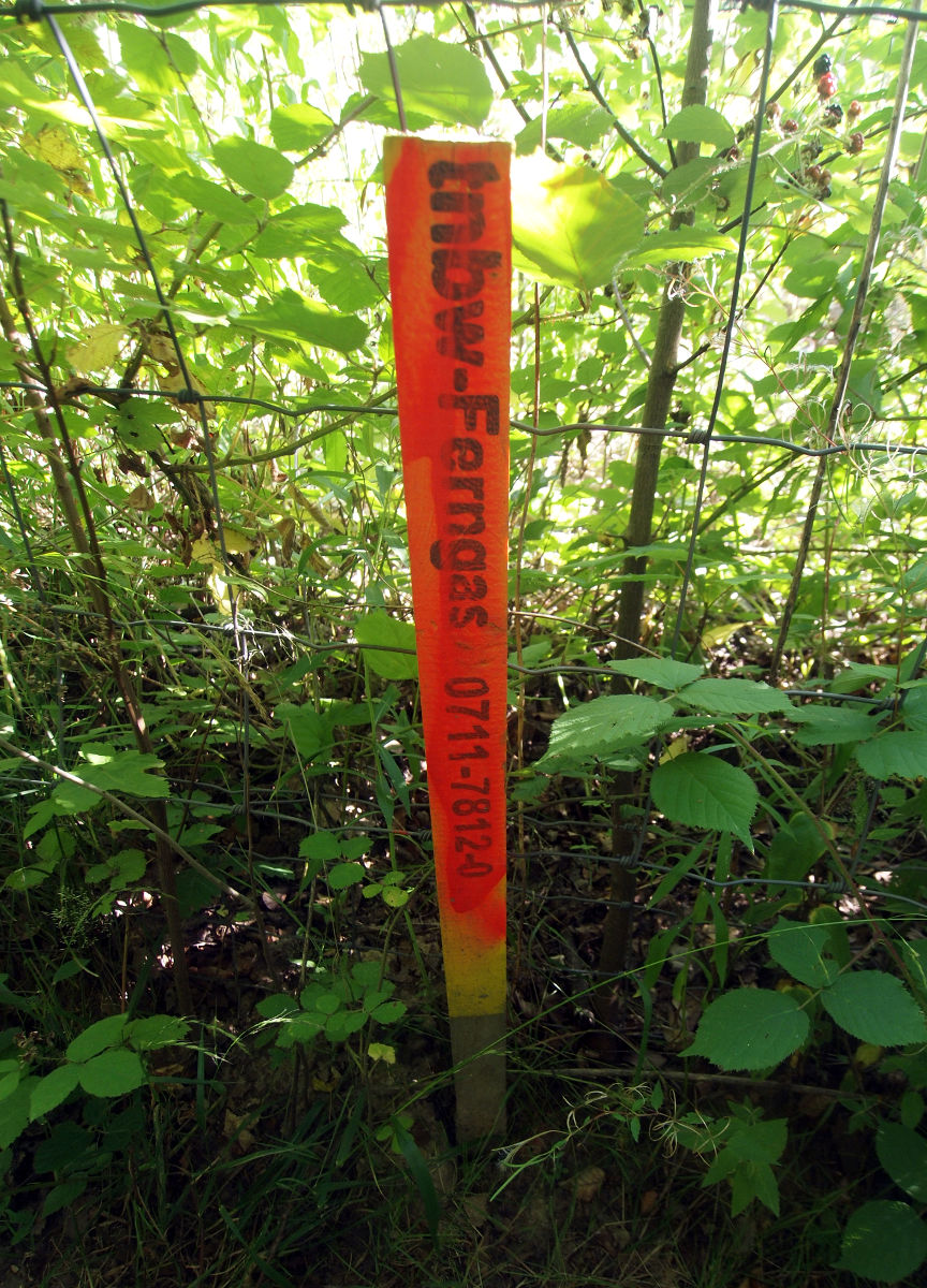 Pflock zur Kennzeichnung der Erdgas-Nordschwarzwaldleitung